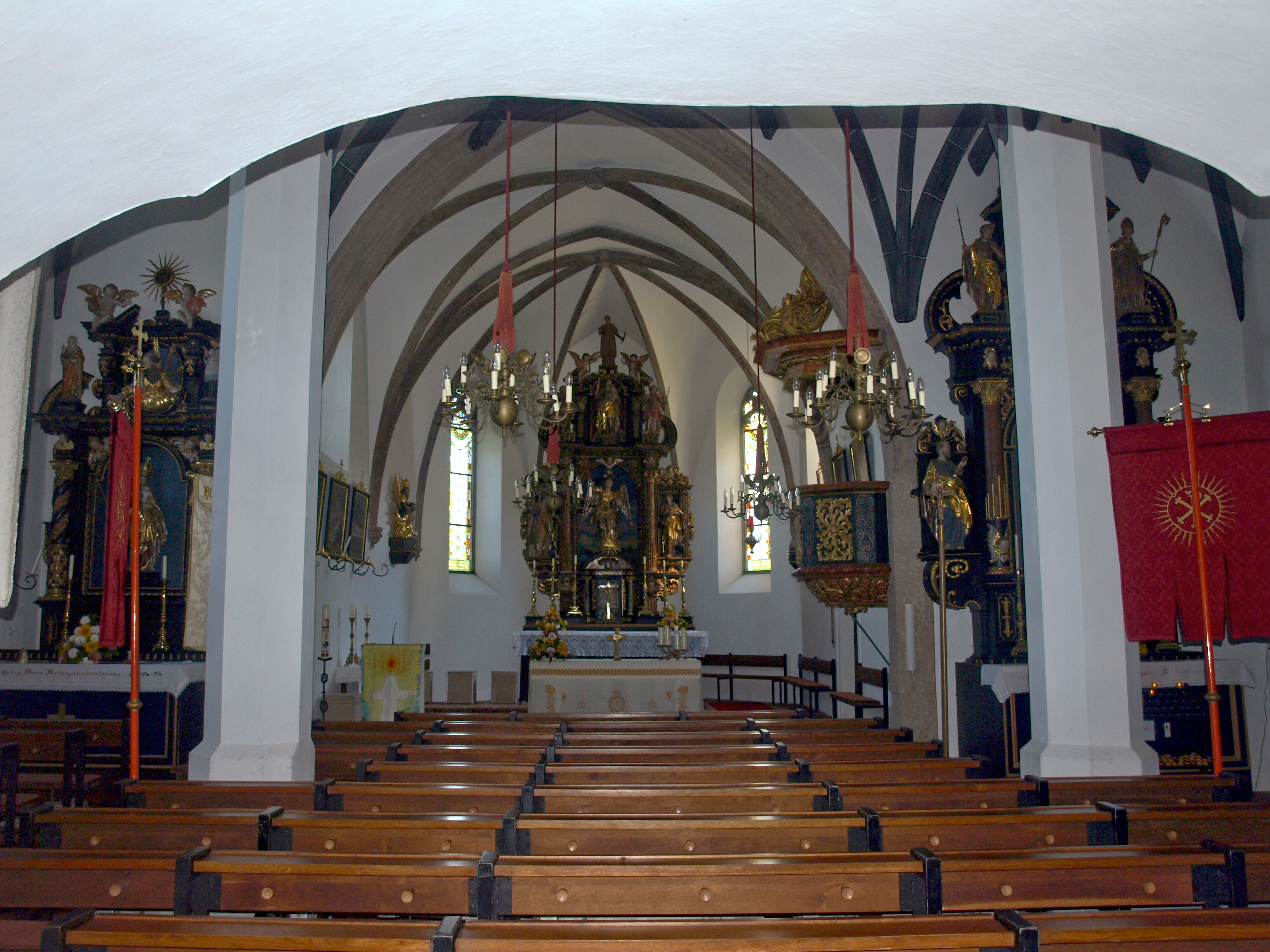 Kath. Pfarrkirche hl. Michael und Friedhof, St. Michael am Bruckbach, Gemeinde St. Peter in der Au